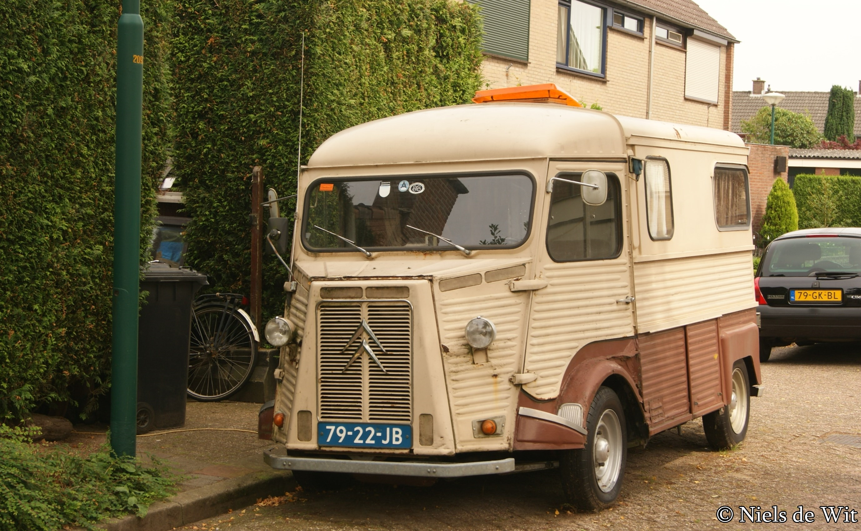 79-22-JB